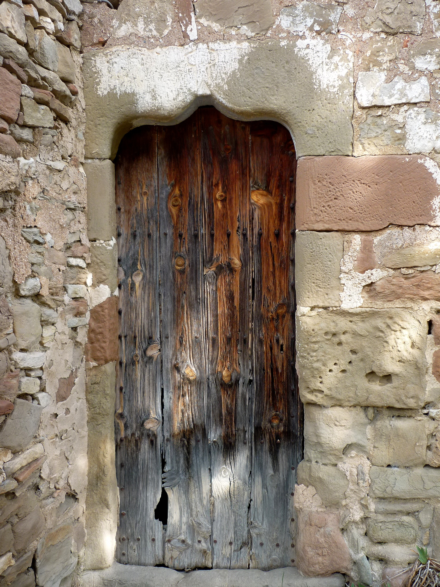 Capella de Santa Eulàlia (la Molsosa): portal